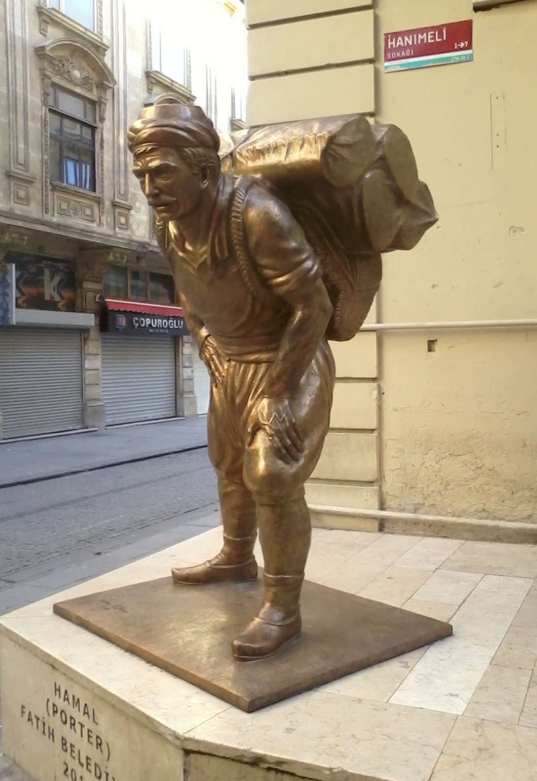 Hamal heykeli.